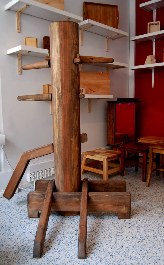 Puutöitä Sovinto ry:n esittelypisteessä (Hämeentie 62, 00500 Helsinki("Kurvi").)